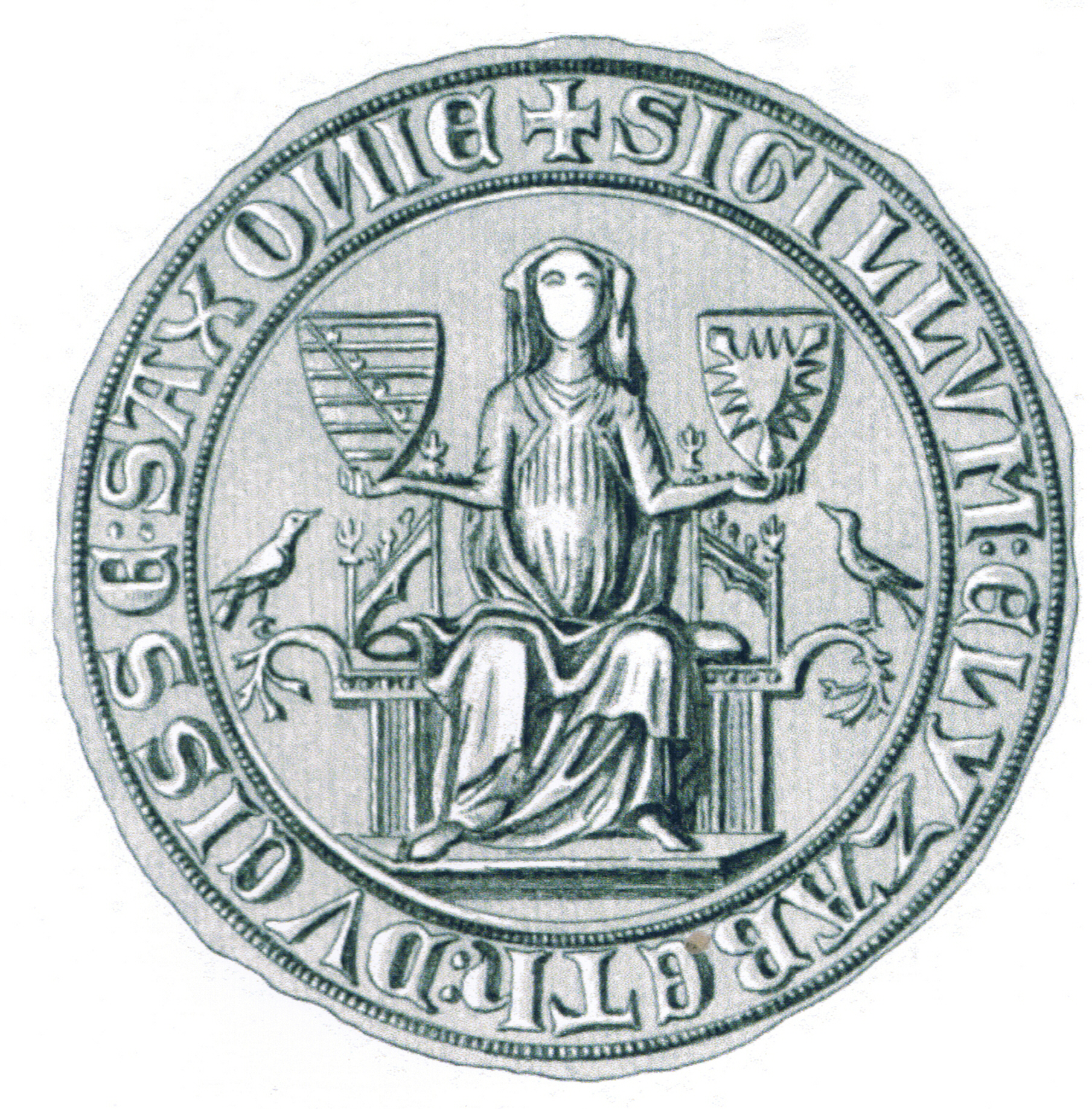 Siegel des Elisabeth (*1300, vor 1340) , Tochter von Heinrich I. (Holstein-Rendsburg) und Heilwig (1265-nach 1324) die Tochter des Grafen Floris von Bronkhorst. Das Siegel stammt aus der Zeit um 1318.